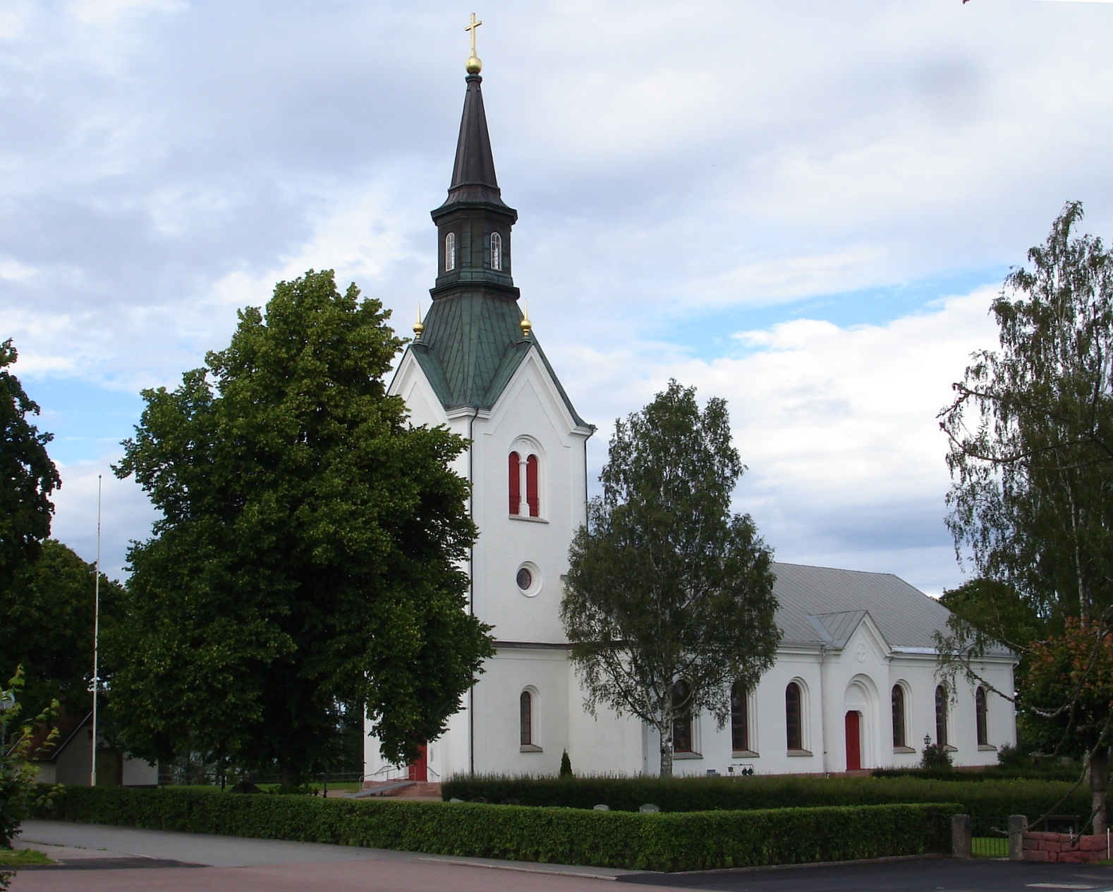 Västra Ryds kyrka i Ydre kommun, Östergötland